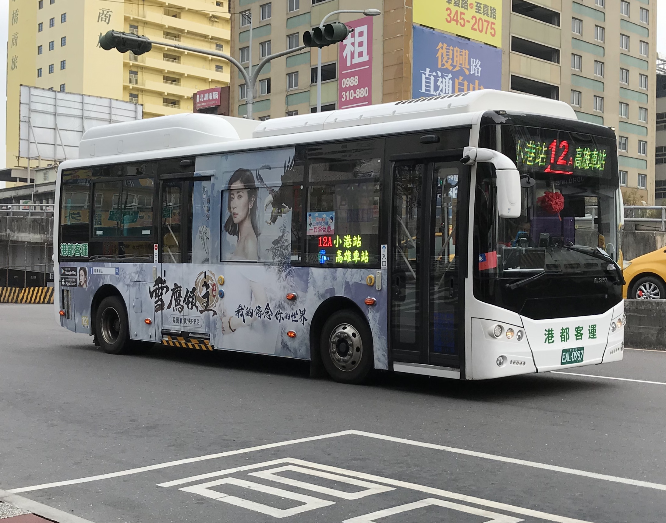 中文（台灣）: 港都客運 12A